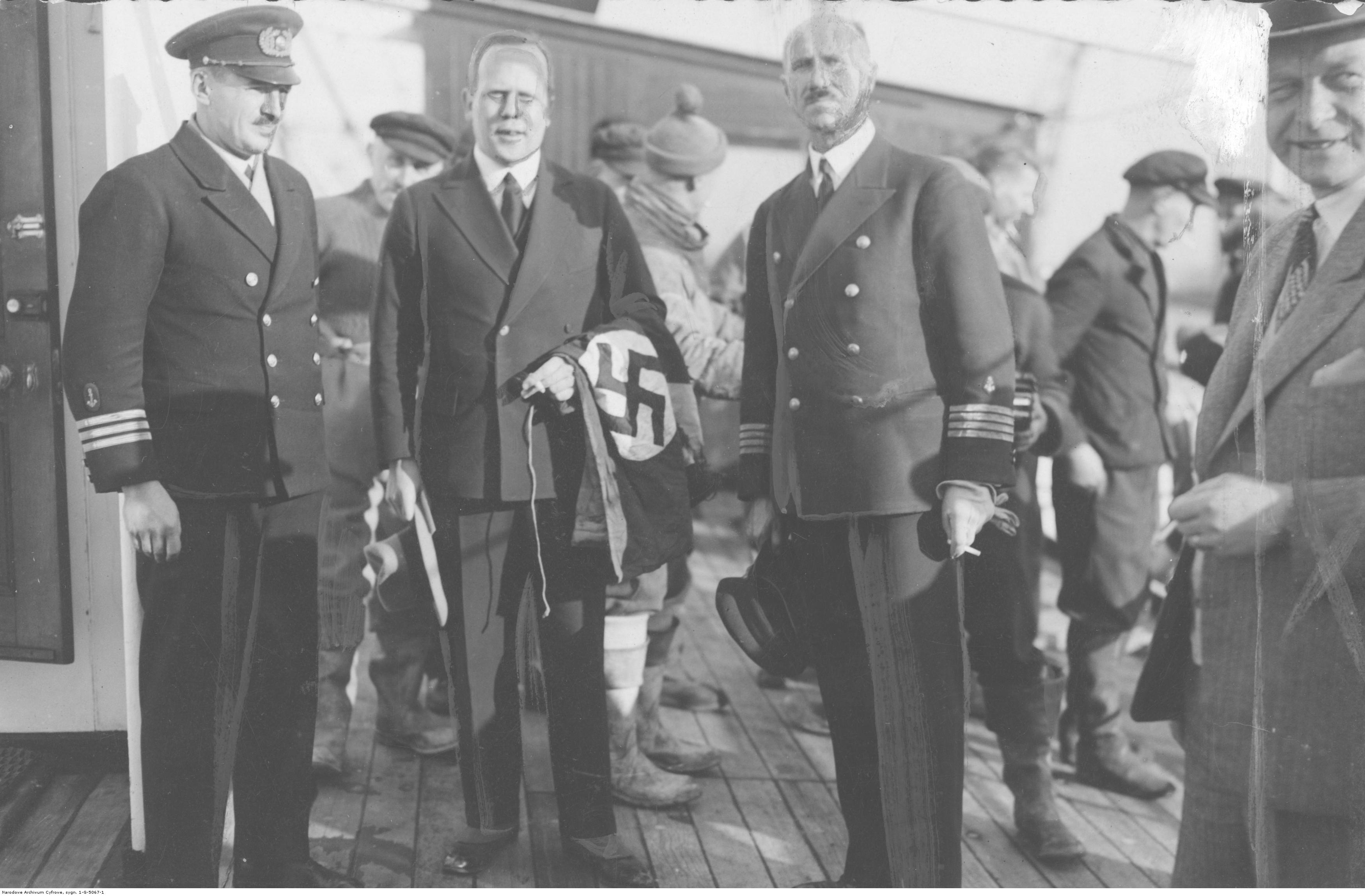 Załogi statków: s/s "Kościuszko" i zatopionego "Horst Wessel". Konsul niemiecki w Toruniu von Hoops (w środku) z banderą zatopionego trawlera "Horst Wessel", z prawej stoi komendant statku "Kościuszko" kapitan Eustazy Borkowski. Koncern Ilustrowany Kurier Codzienny - Archiwum Ilustracji. Sygnatura: 1-G-5067-1